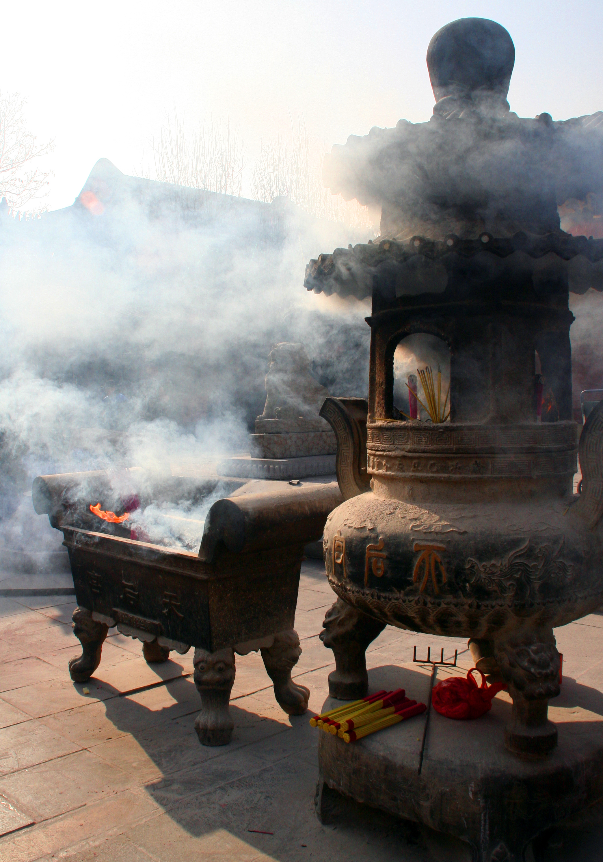 Tianjin, China